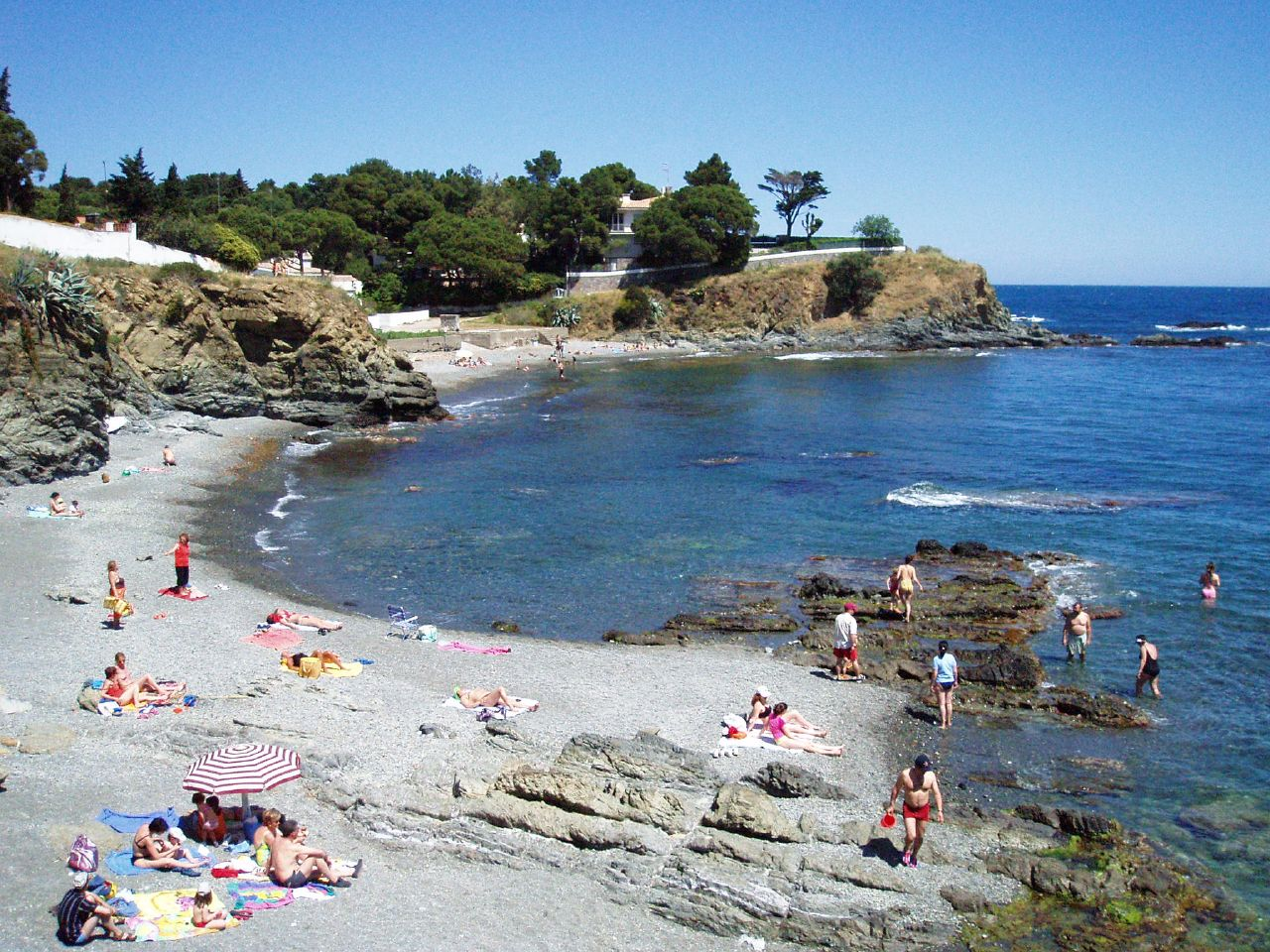 Llançà, Alt empordà, Catalunya.